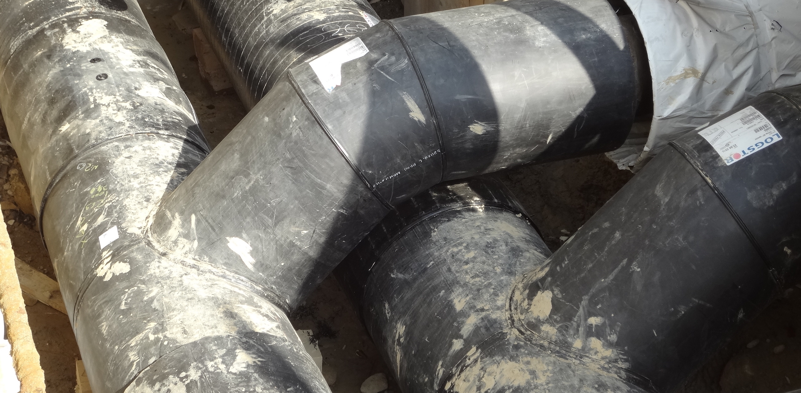 Installation de conduites pour le chauffage à distance dans le quartier du Mervelet à Genève. Extension du réseau CAD SIG (chauffage à distance des Services industriels de Genève).